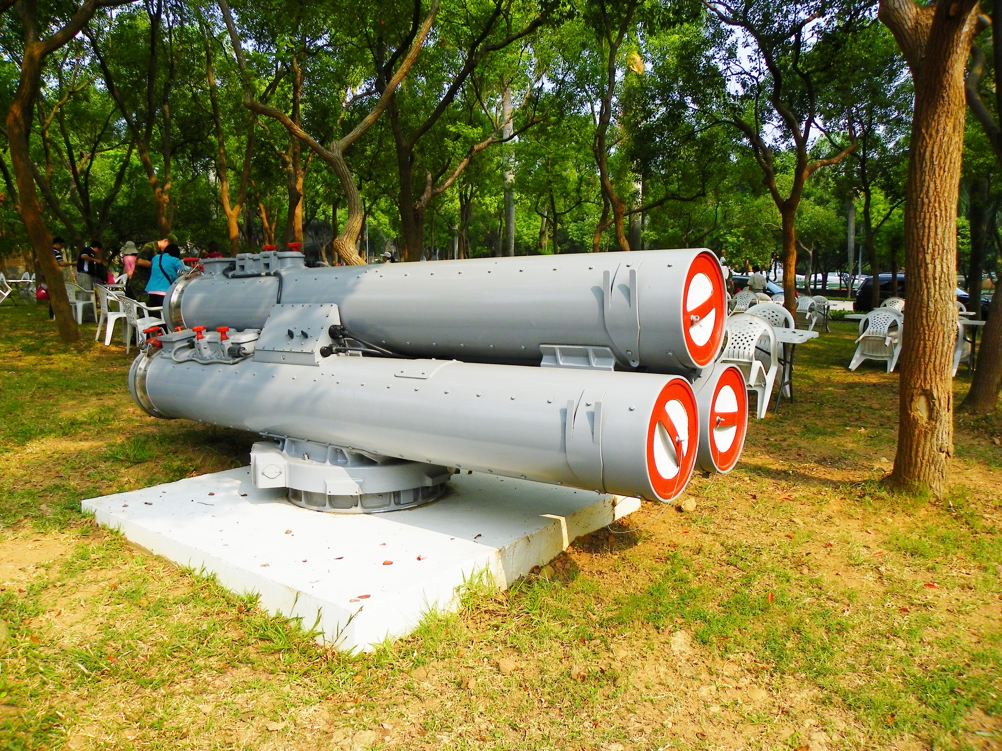 安置於成功嶺忠誠二路路邊的MK-32三聯裝魚雷發射管，2012年營區開放活動攝影。